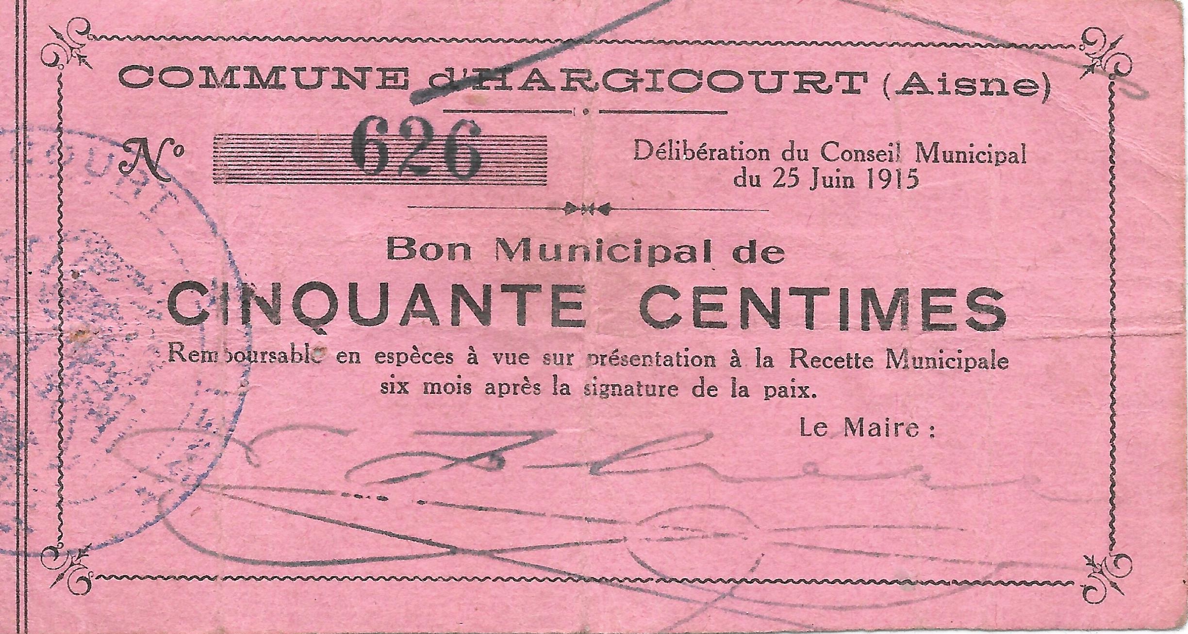 Bon municipal émis par la commune en 1915